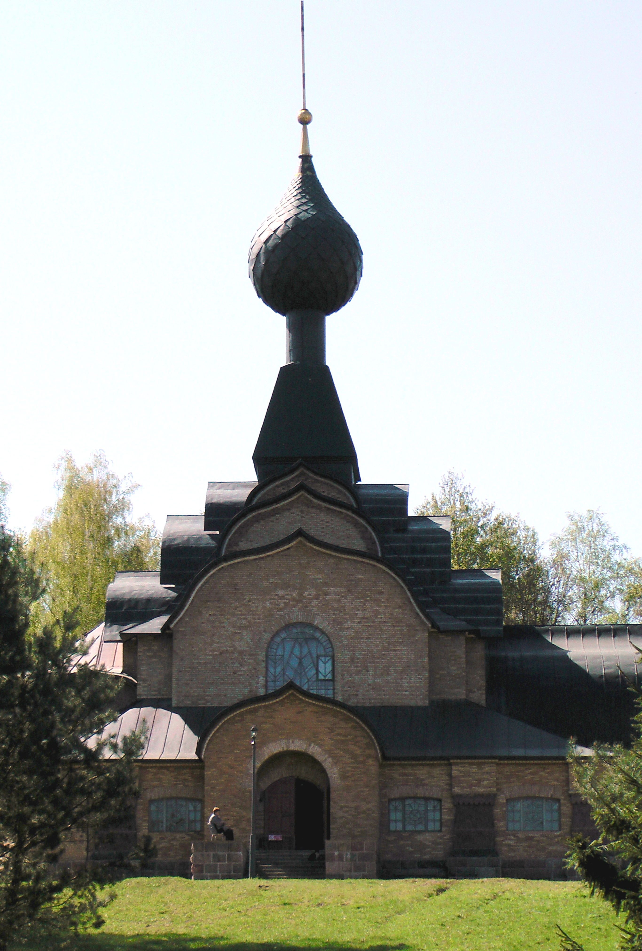 Храм Святого Духа в Талашкино